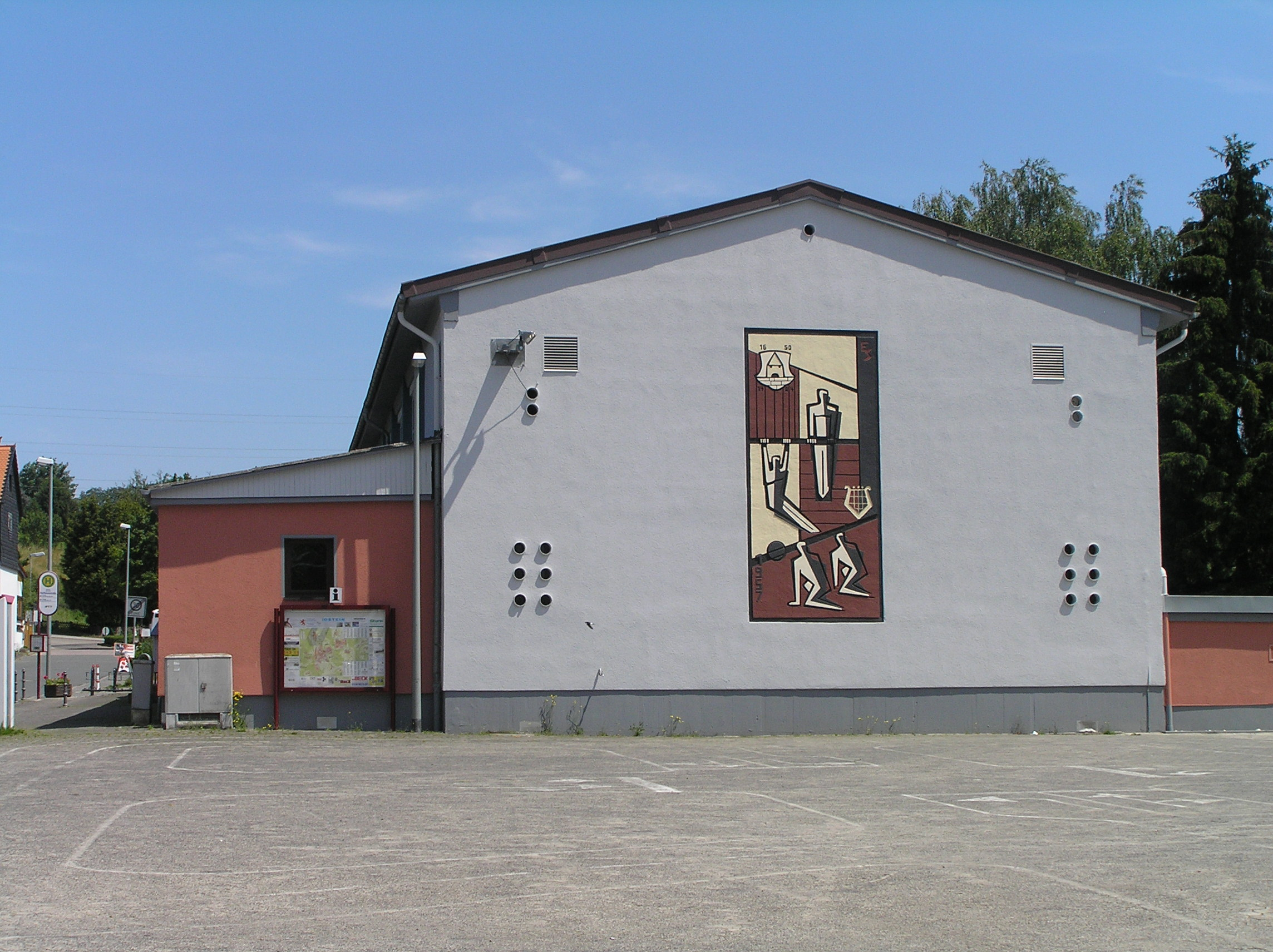 Heftrich, Willy Mohr Halle